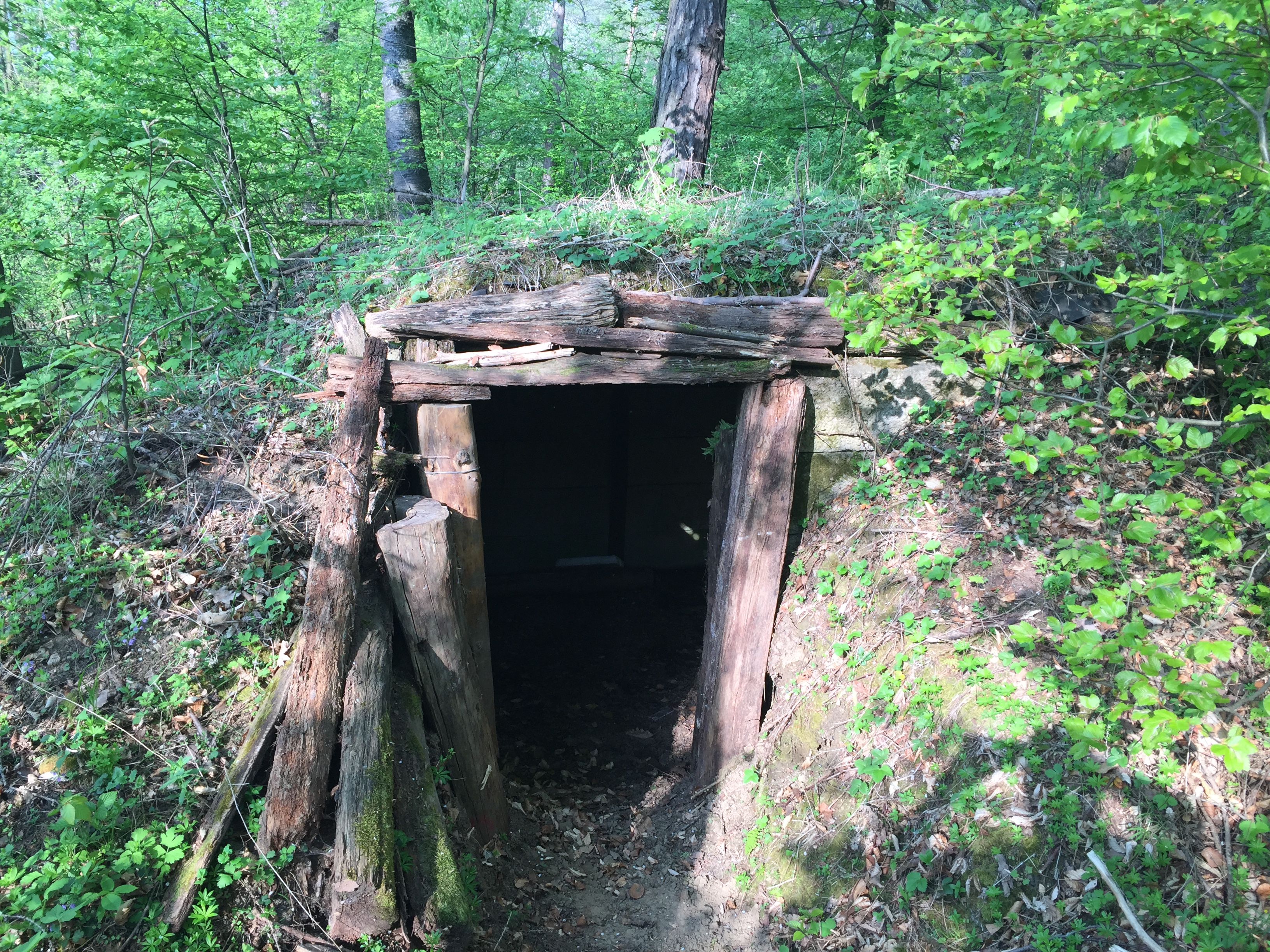 Pozostatky z bojiska /bunker/